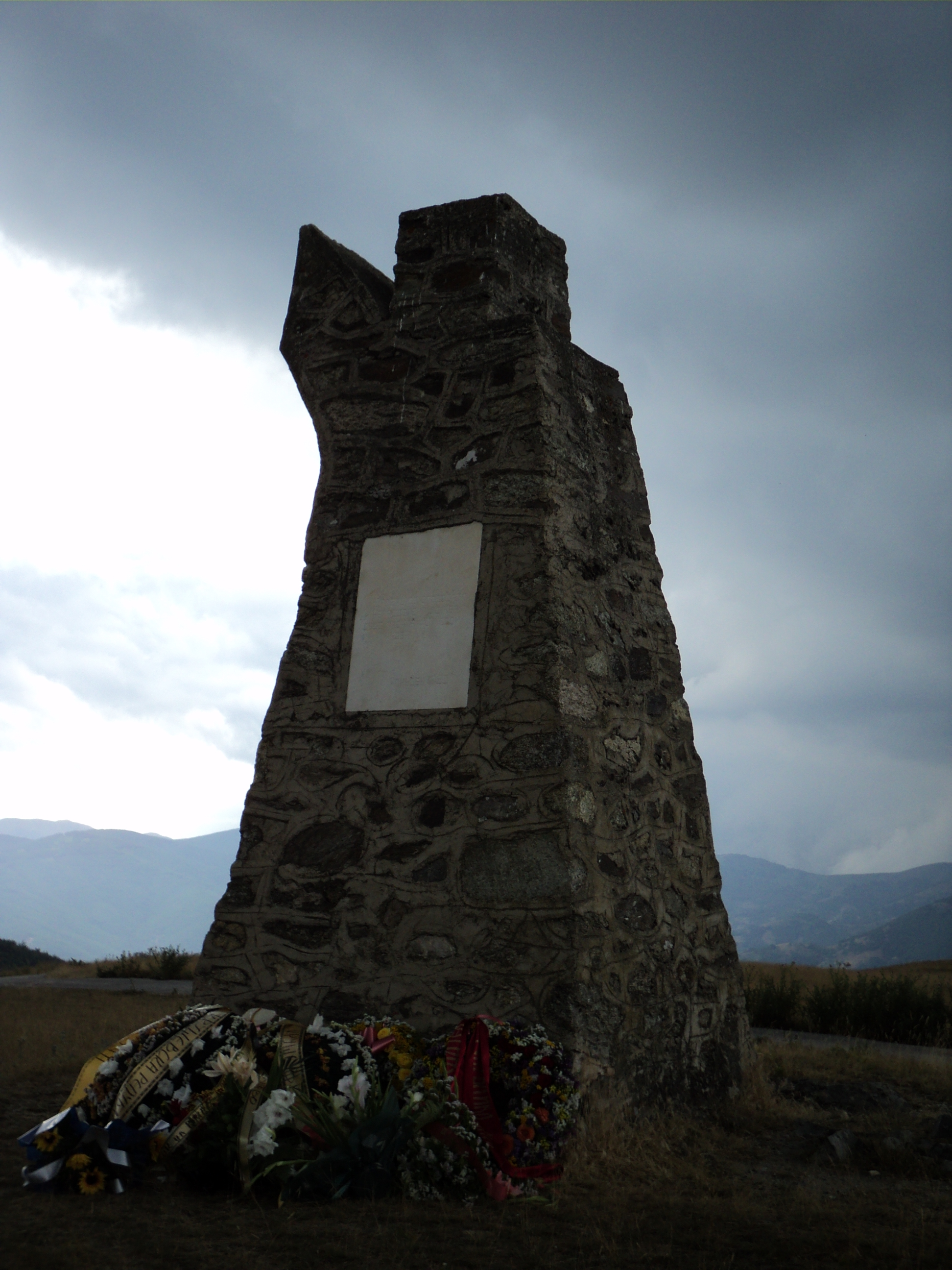 Spomenik na brdu Sliva iznad Kruševa, jedna od lokacija gde su branioci Kruševske republike 1903. do poslednjeg čoveka pružali otpor osmanlijskim snagama